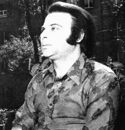 Italian accordionist Salvatore di Gesualdo